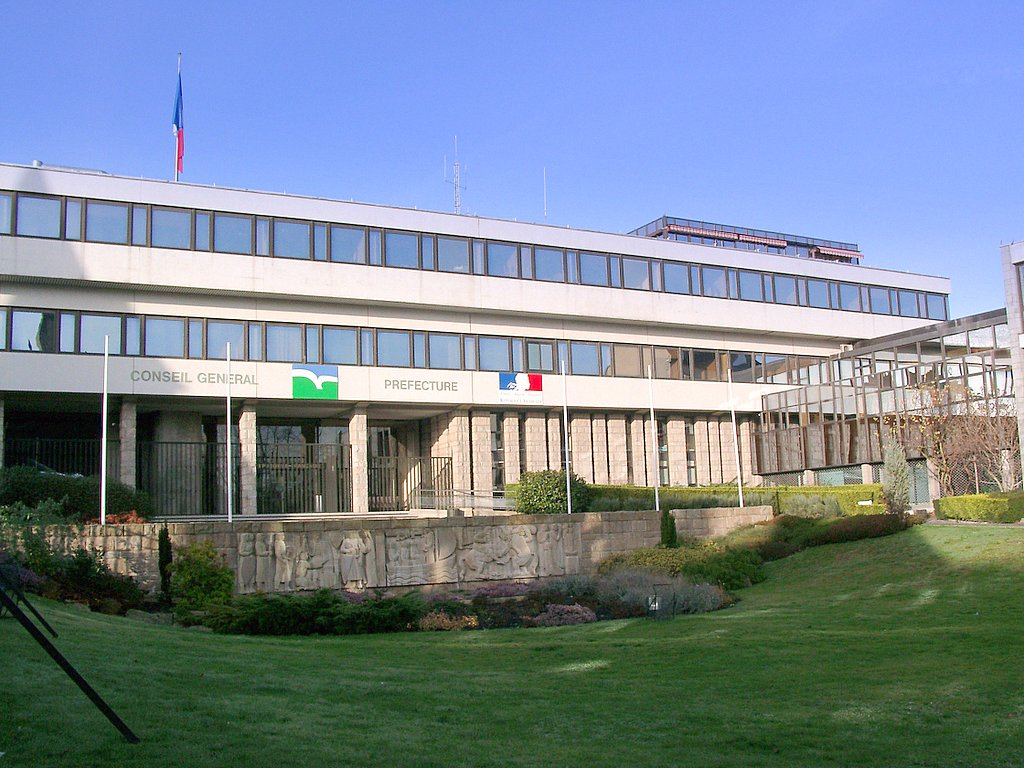 Préfecture des Côtes-d'Armor à Saint-Brieuc, France